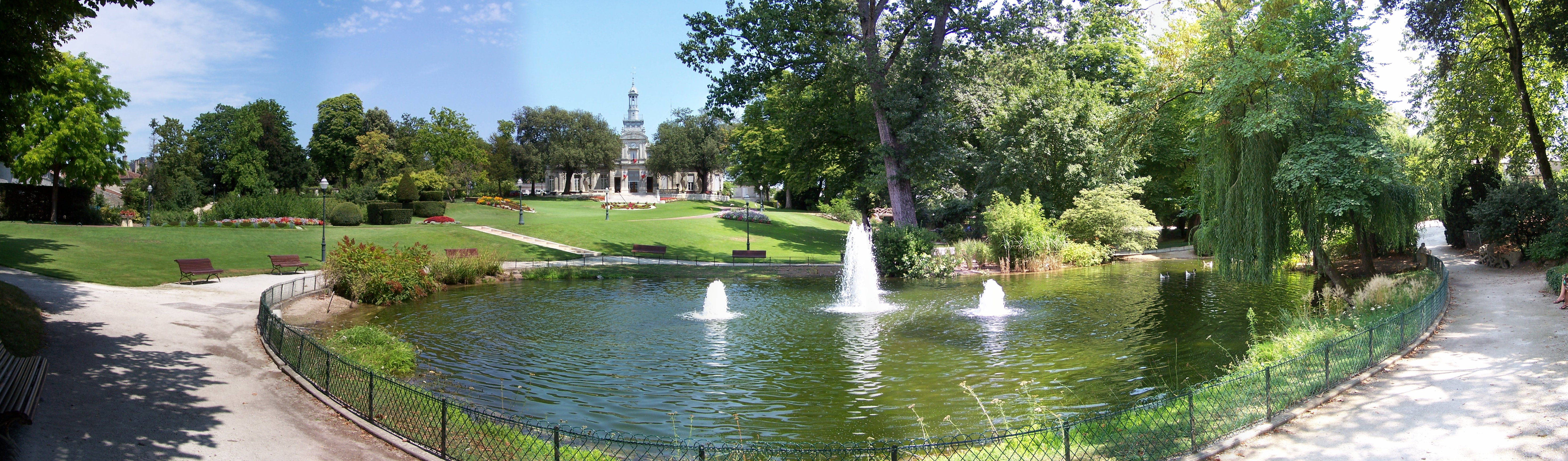 Panoramique du parc de l'hotel de ville de Cognac, créé avec Hugin et GIMP à partir de photographies personnelles.